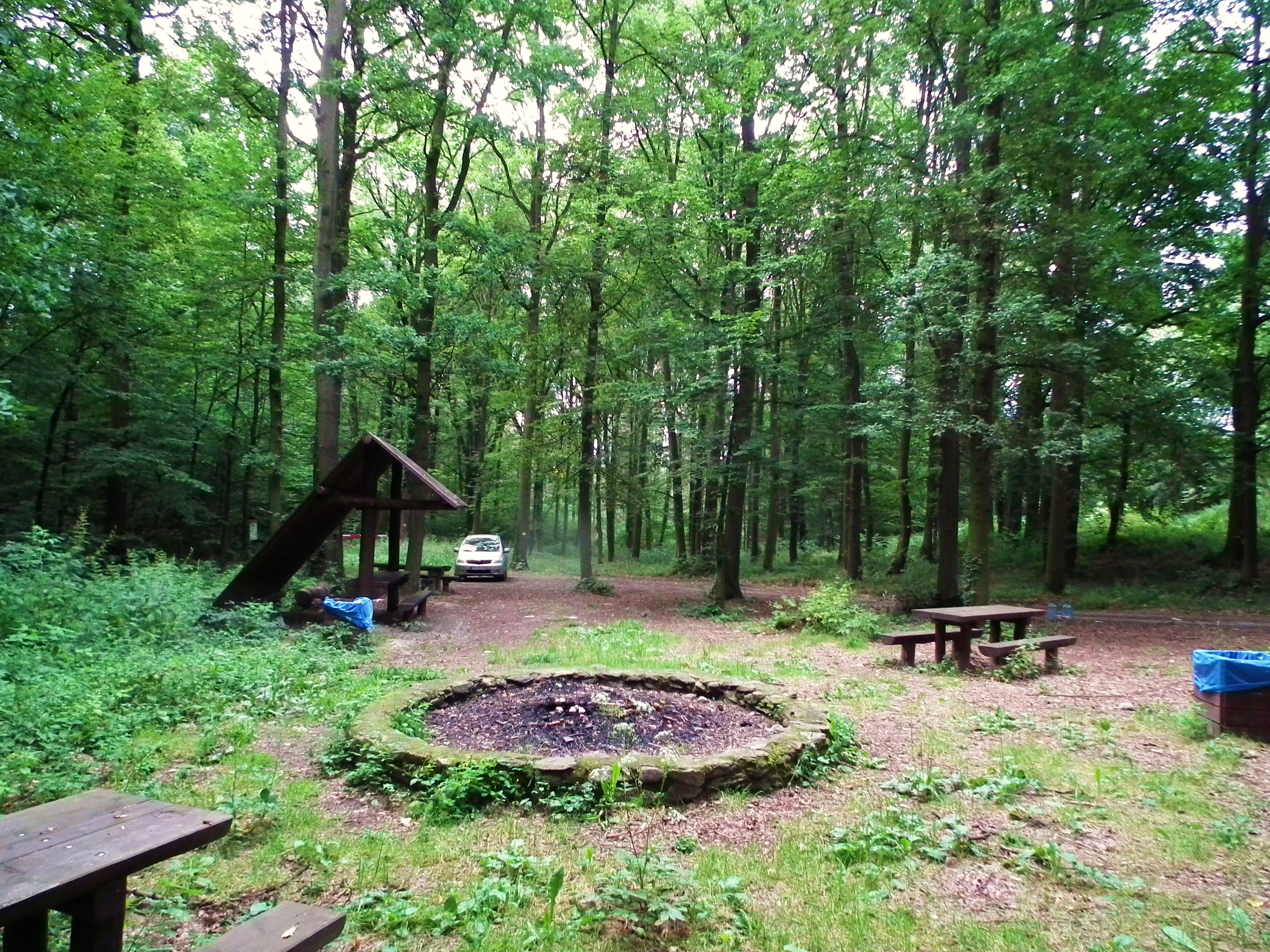 Dolina Tatarska pod Gilowem.